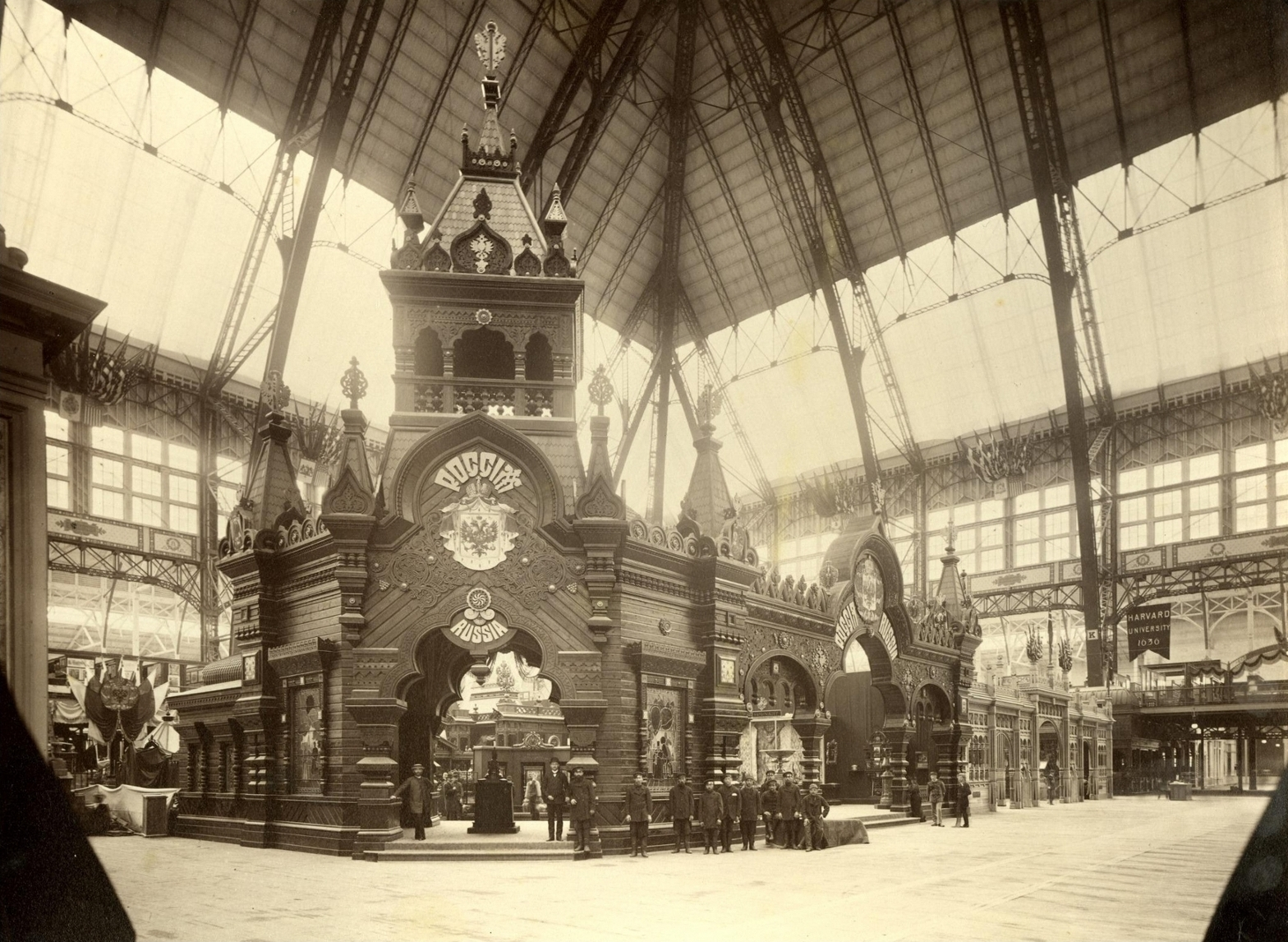 Фасад русского отдела в Manufactures and Liberal Arts Building всемирной выставки в Чикаго 1893 года.